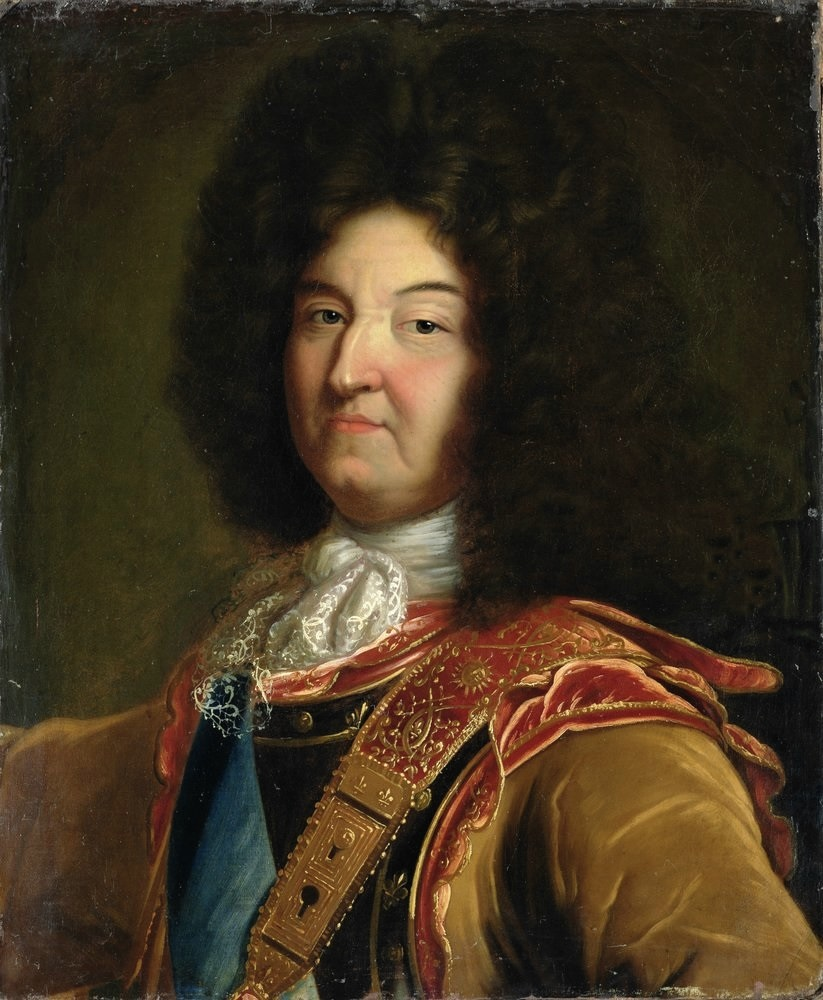 Louis XIV, 1701